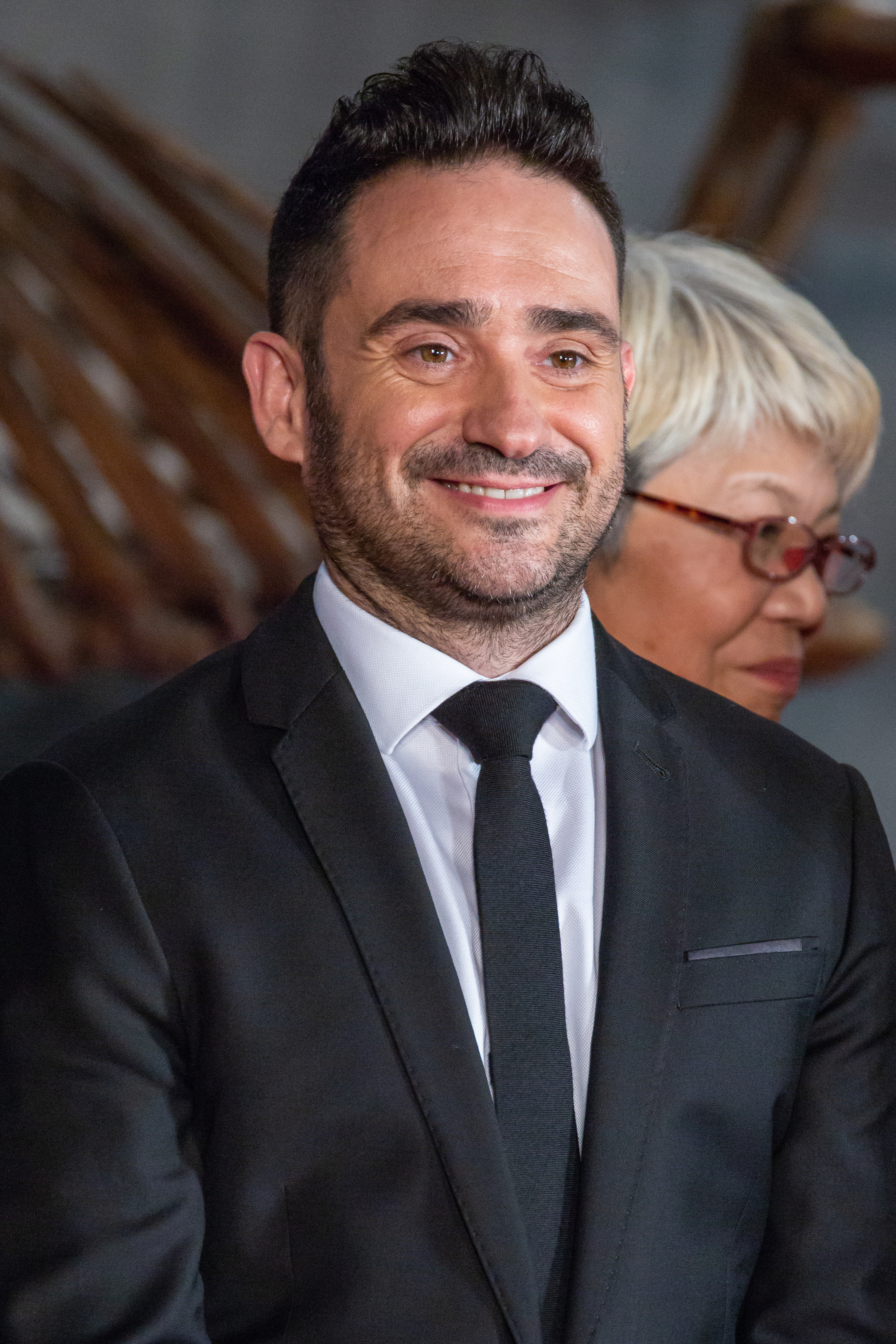 ジュラシック・ワールド/炎の王国 ジャパン・プレミア レッドカーペット J・A・バヨナ